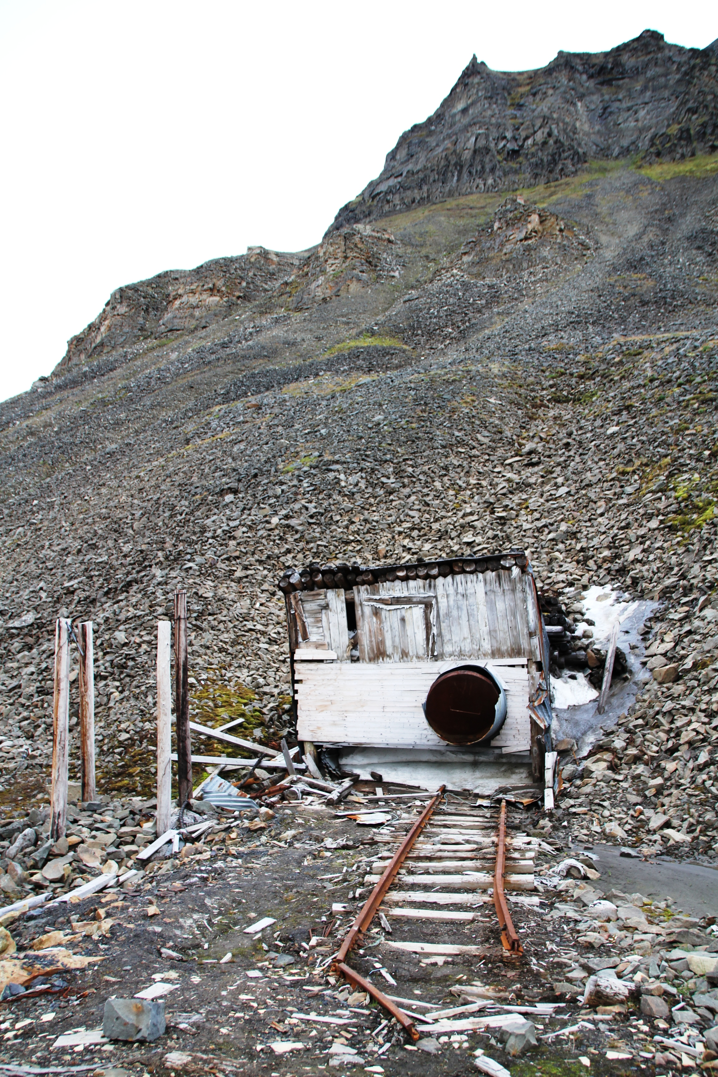 Mine No 3 remains, above Longyerdalen moraine, Svalbard